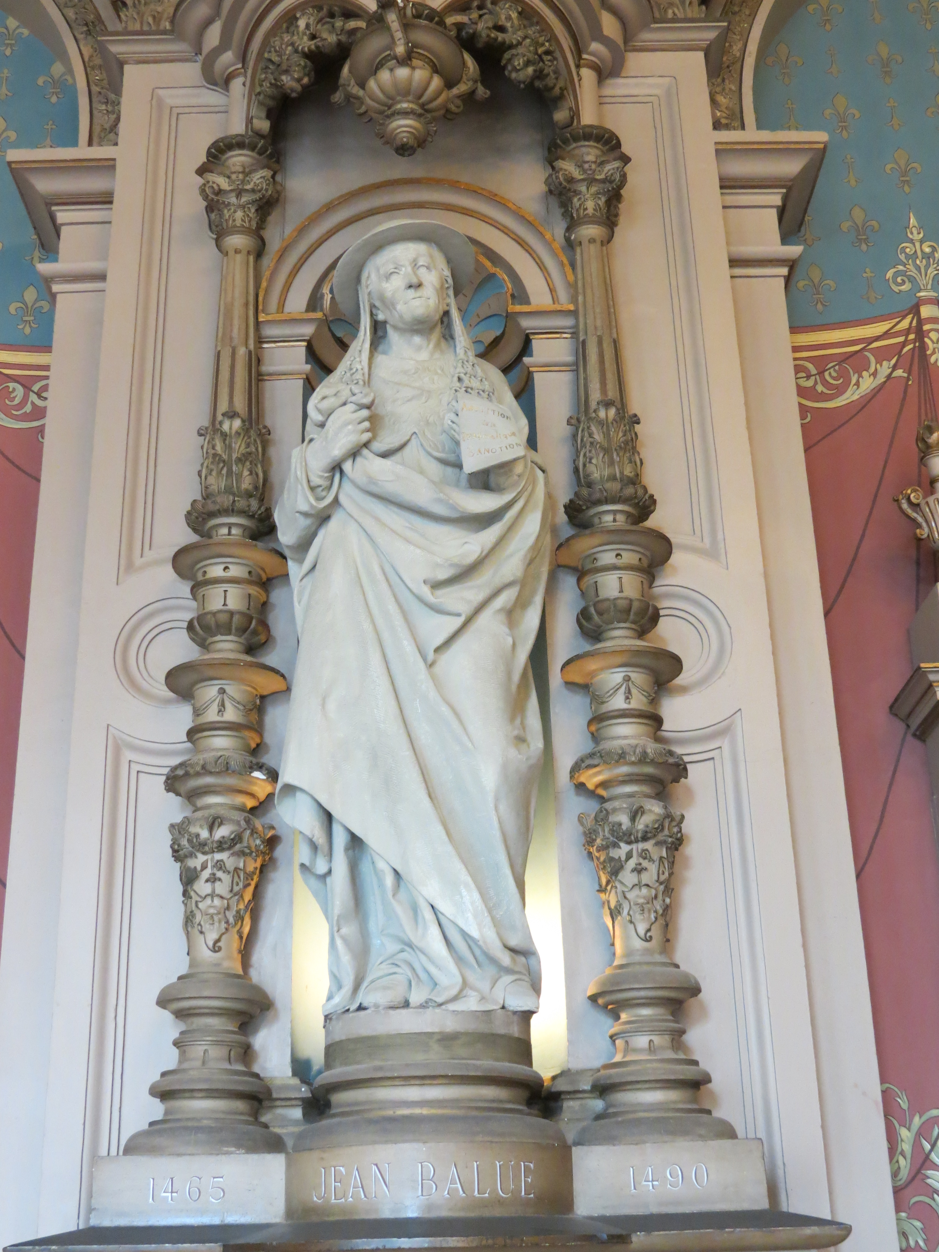 Jean Balue, 26e abbé de Fécamp (1465-1482).